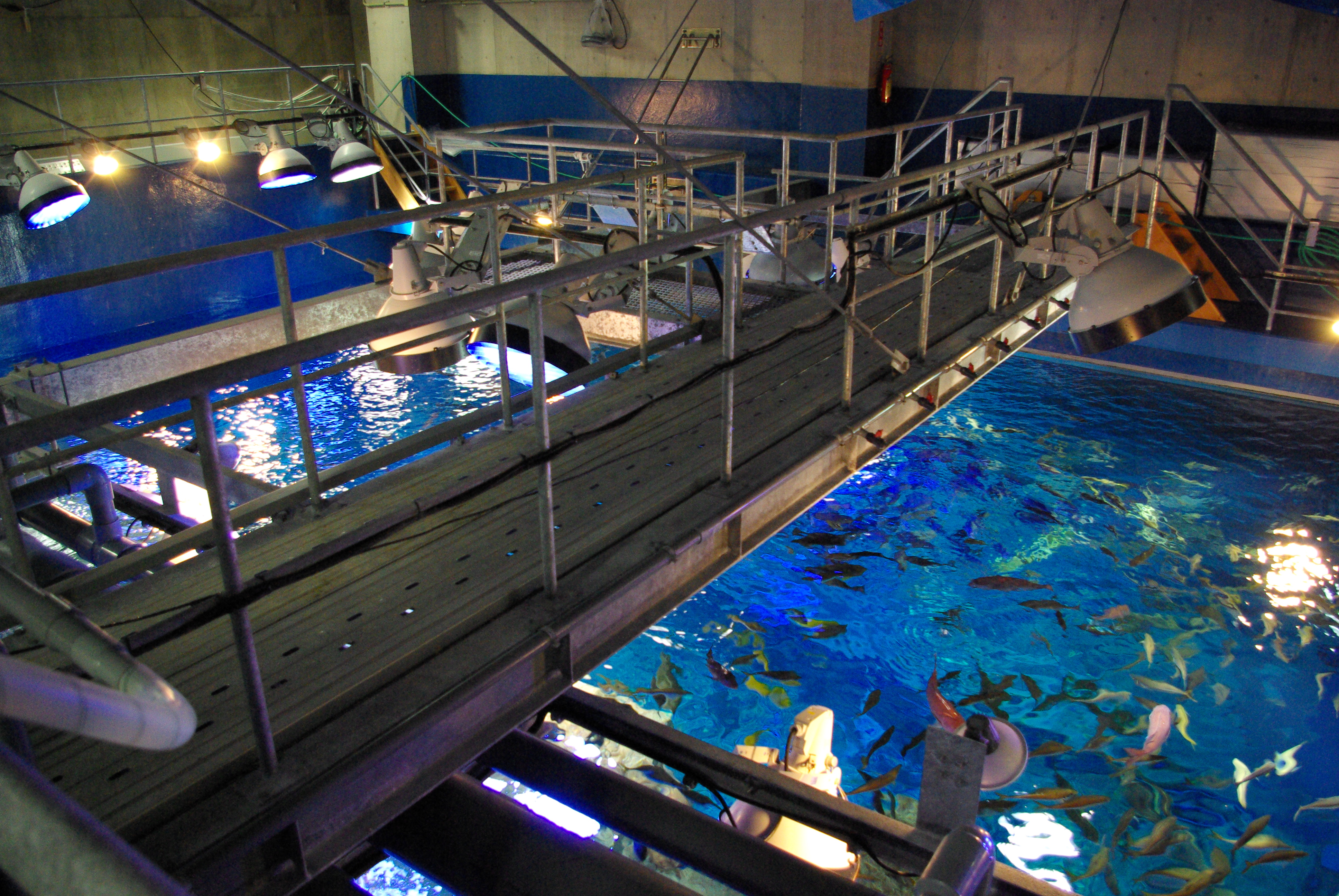 Oga Aquarium GAO